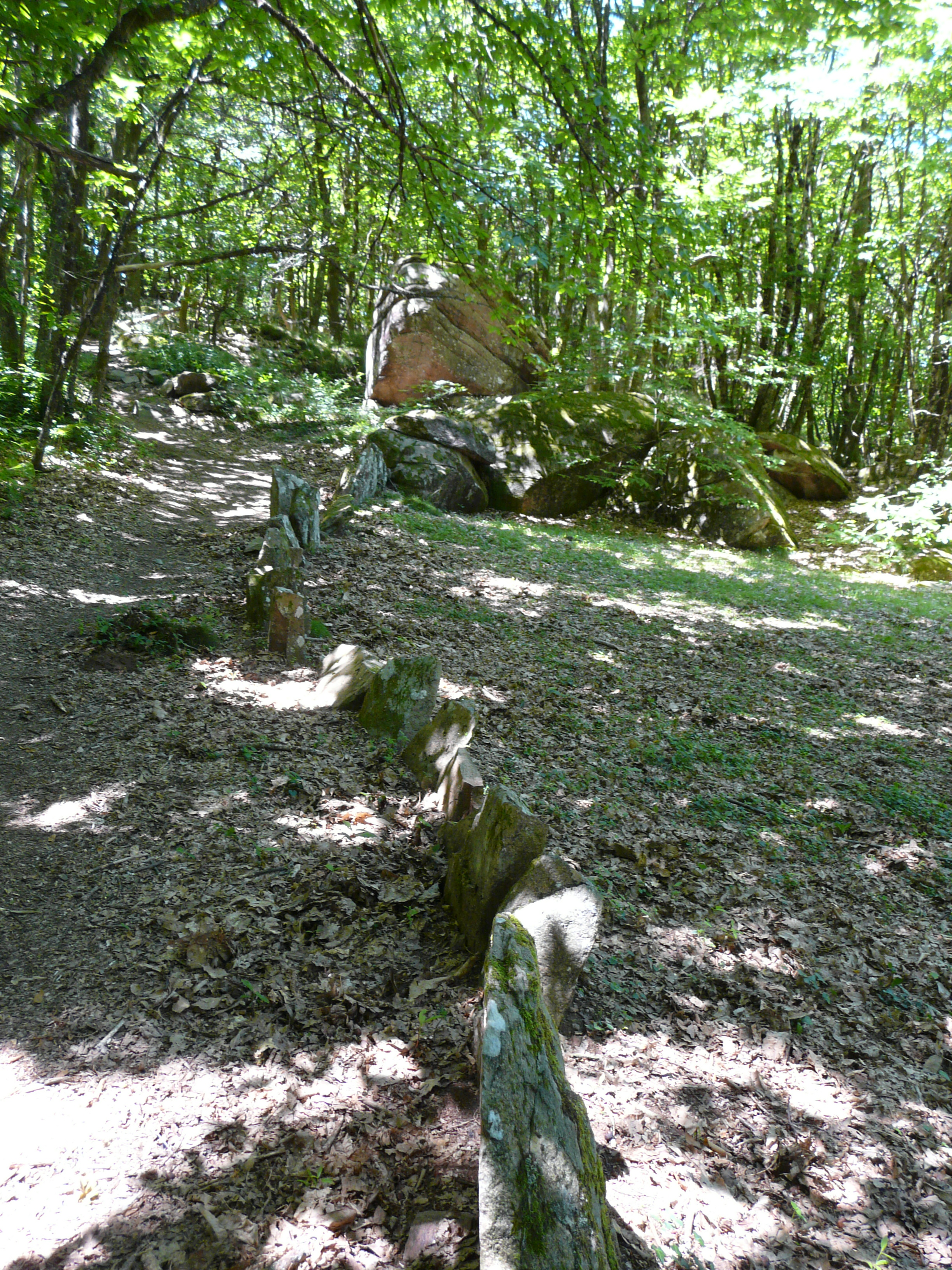 L'alignement de pierres, cromlech du Puy de Pauliac, Aubazines, Corrèze, France.